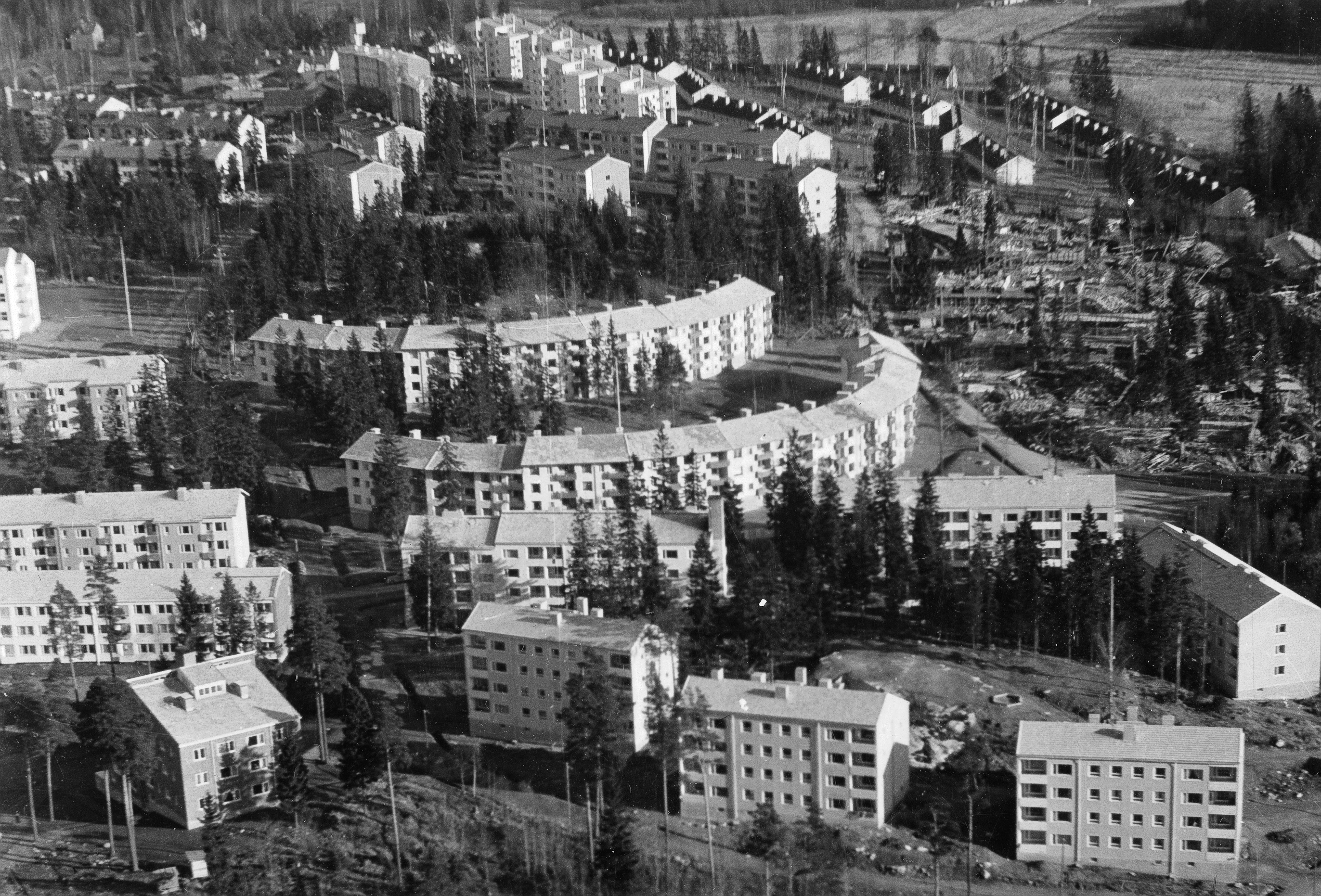 Maunula, Haavikkotie 18, 16, 14, 12, 10, 8 ja 13, 11, 9. Oikealla Koivikkotie.